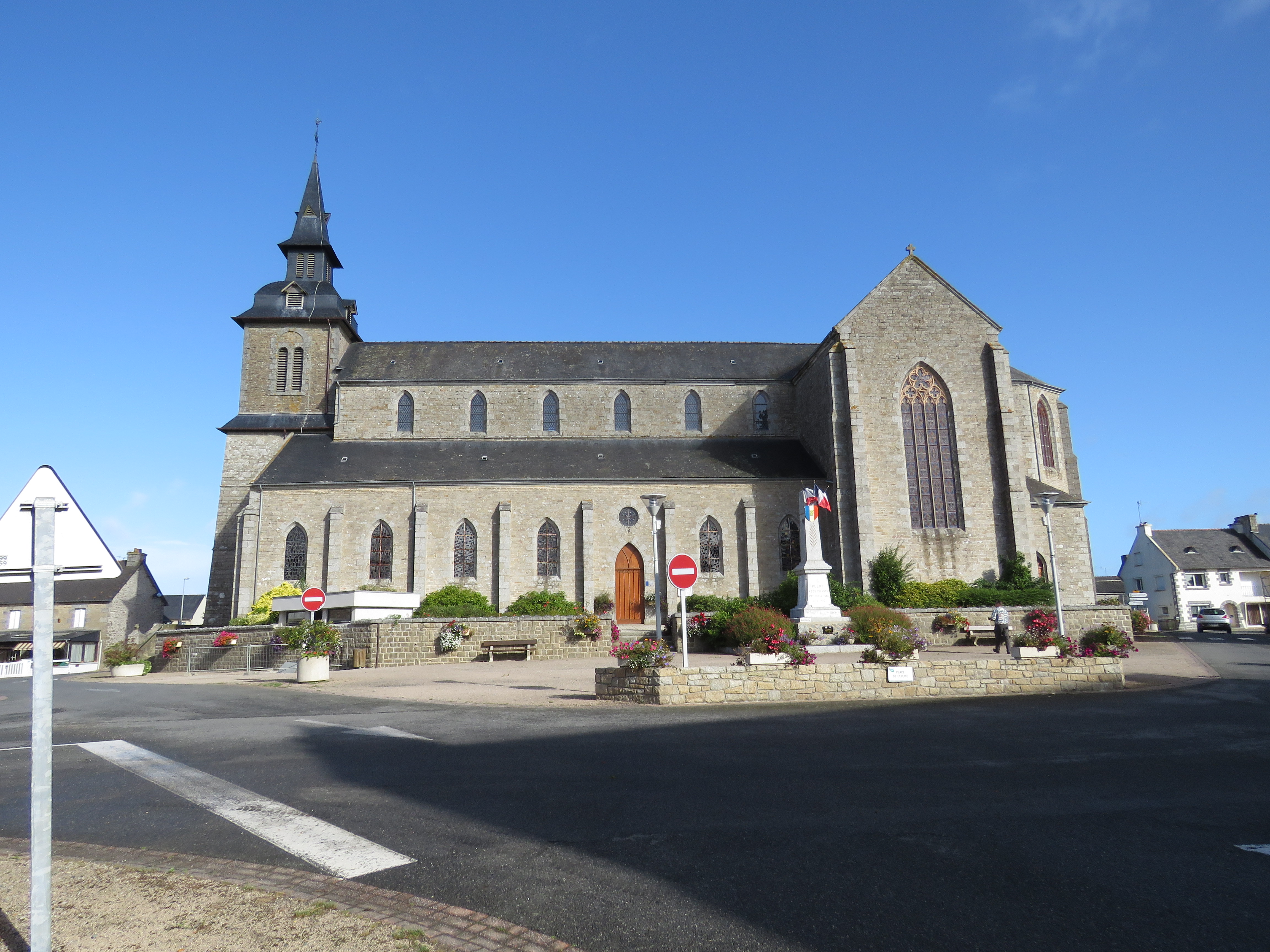 église